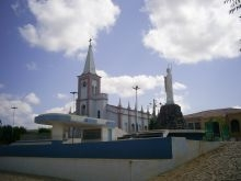 bica